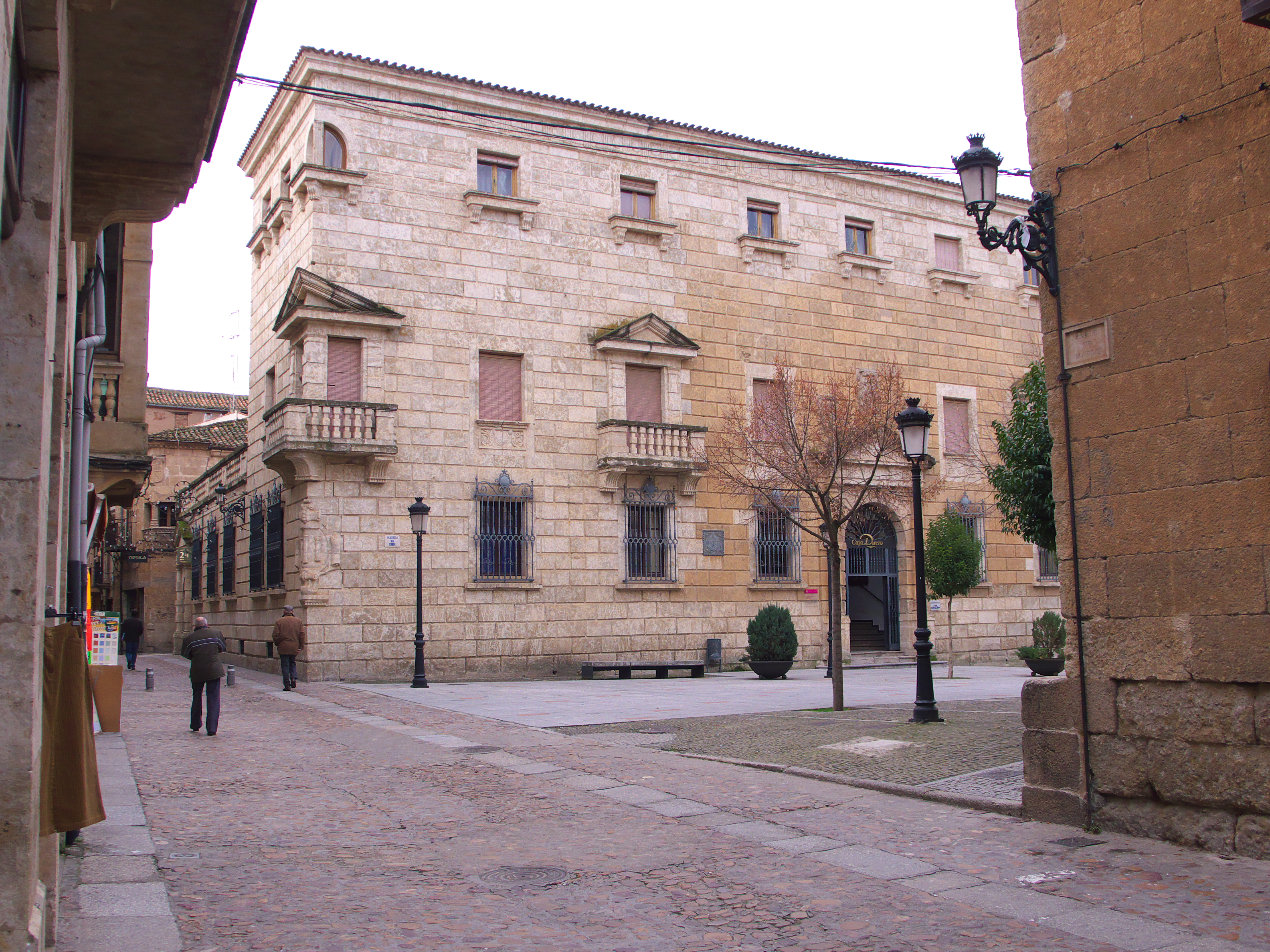 Felipe IV, concede el Condado de Alba de Yeltes (1659), a don Luis Nieto de Silva Gama y Melo.